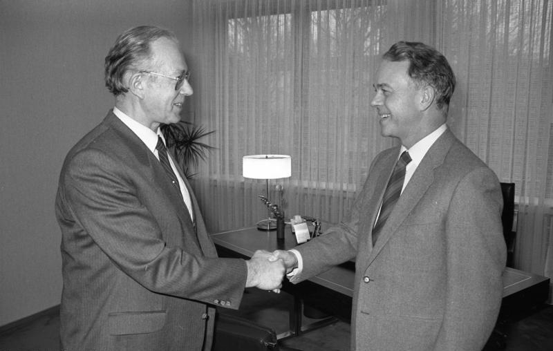 16.12.1985 Der Präsident des Bundesrates und niedersächsische Ministerpräsident, Dr. Ernst Albrecht (rechts), empfängt den Präsidenten des Bundesrechnungshofes, Heinz Günther Zavelberg zum Antrittsbesuch im Bundesrat.